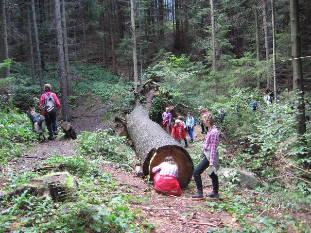 Torzo Vopařilovy jedle, hranice k. ú. Lubná a Široký Důl